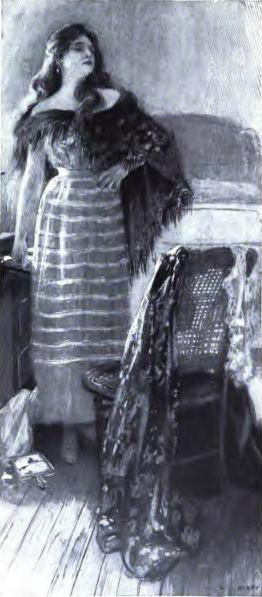 "Tessie", illustration de la nouvelle "The Yellow Sign" dans le recueil "The King in Yellow" de Robert W. Chambers, New York / Londres, Harper & Brothers Publishers, 1902.